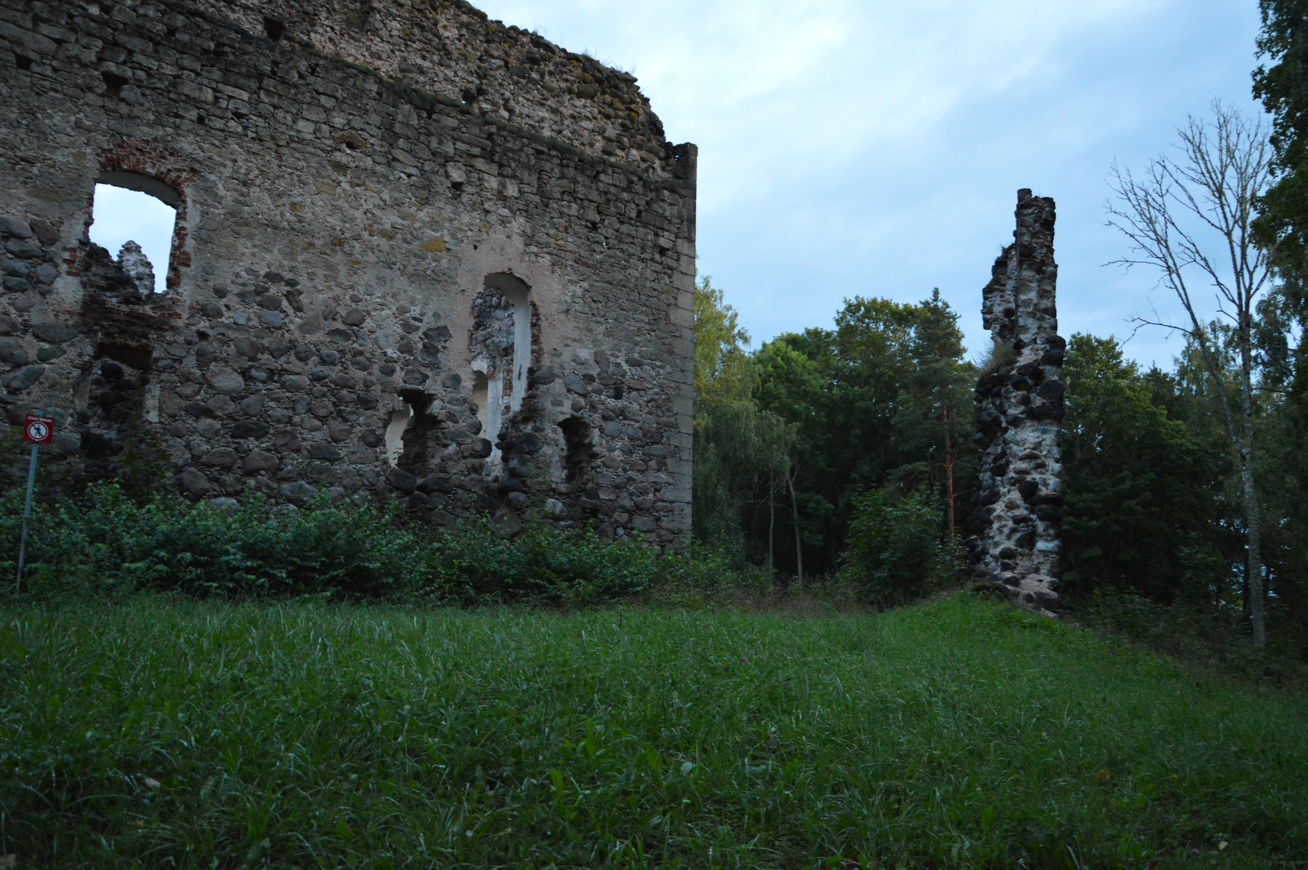 Rauna piiskopilinnus